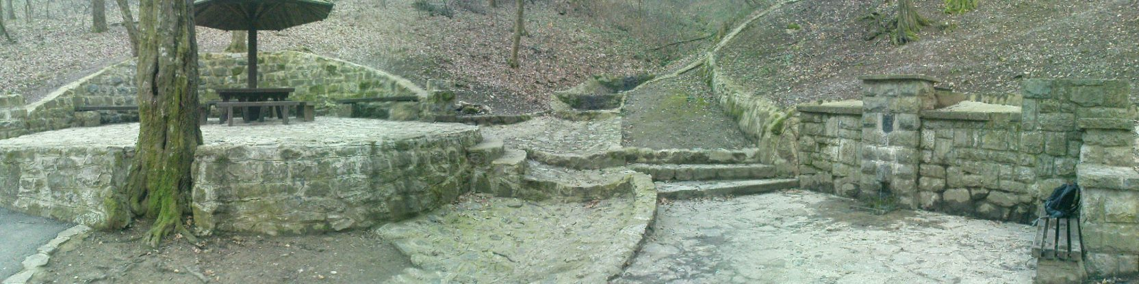 panorama Sakinac, N.S.